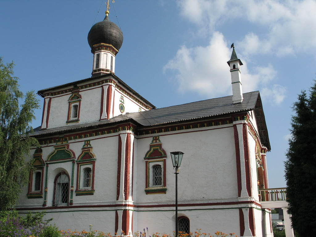 Novo-golutvin Svjato-Troitsky monastiry in Kolomna. Summer 2006